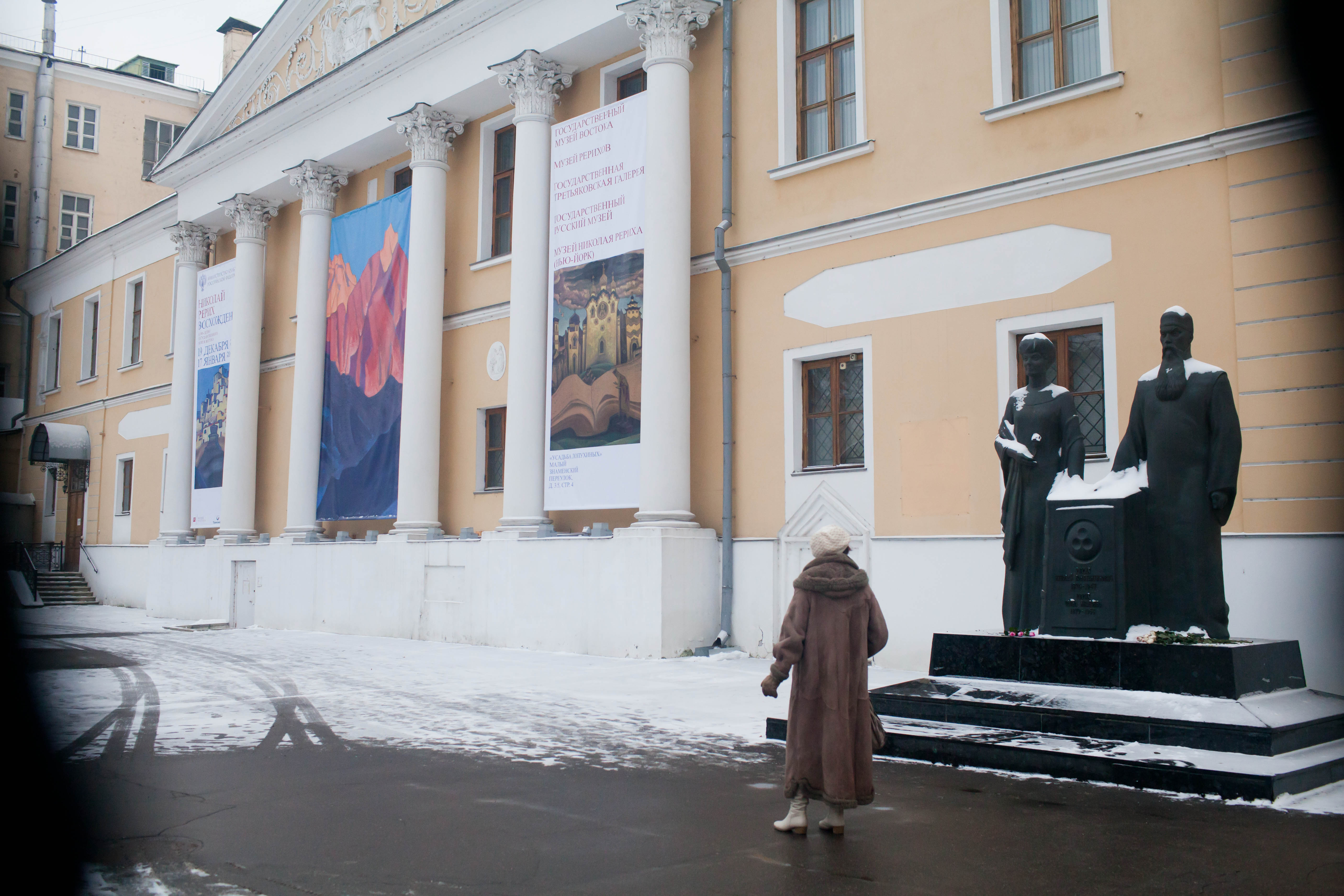 Выставка "Николай Рерих. Восхождение" в Музее Рерихов (Усадьба Лопухиных, Малый Знаменский переулок, д.3/5, стр.4; 20 декабря 2017 – 17 января 2018)